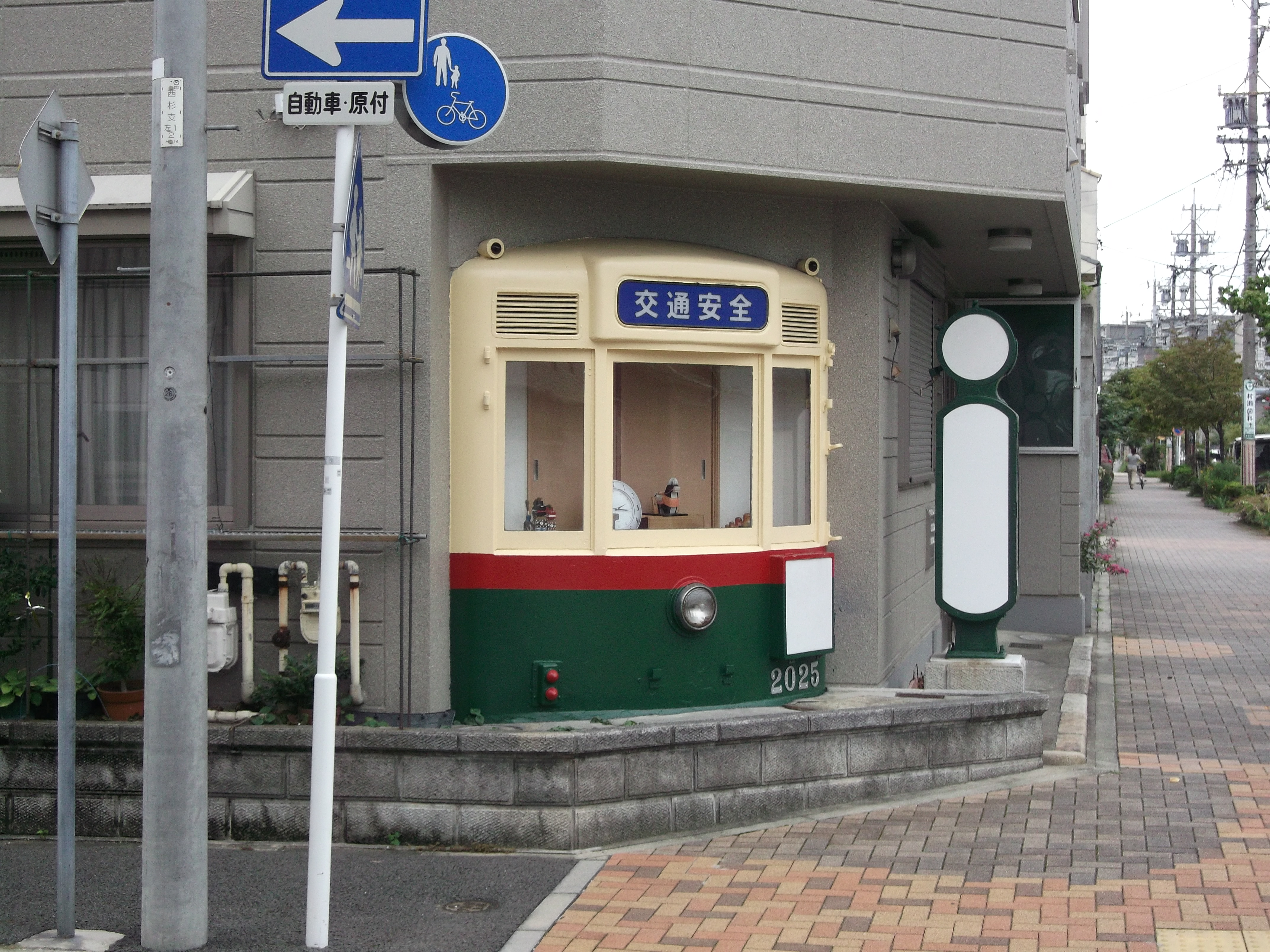 名古屋市北区清水に保存されている名古屋市電2025形の先頭部分。かつては旅行代理店だったが、現在は個人宅。